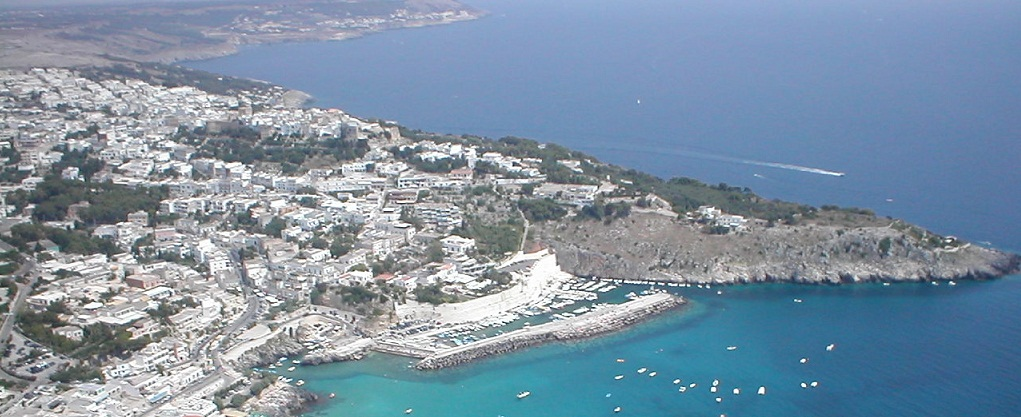 Panorama di Castro